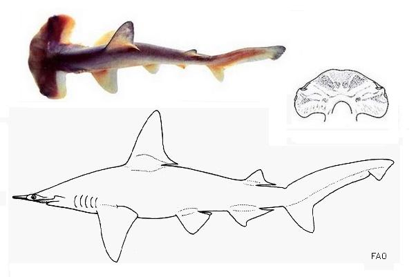 Sphyrna tudes (Valenciennes, 1822)